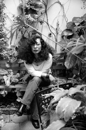 Ana Clavel según la lente de Barry Domínguez (México, 2009)